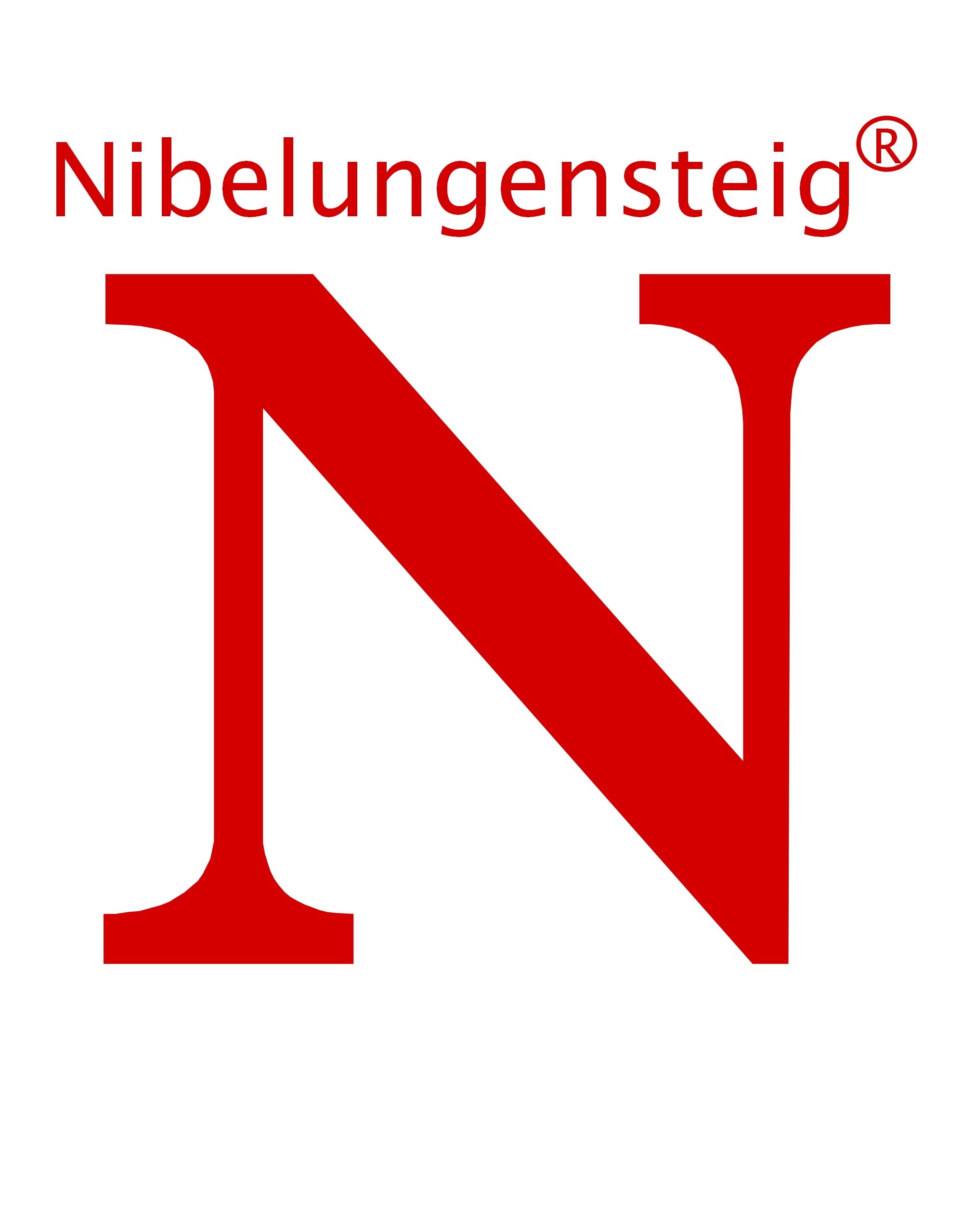 Eingetragene Marke und Wegemarkierungszeichen des Nibelungensteigs